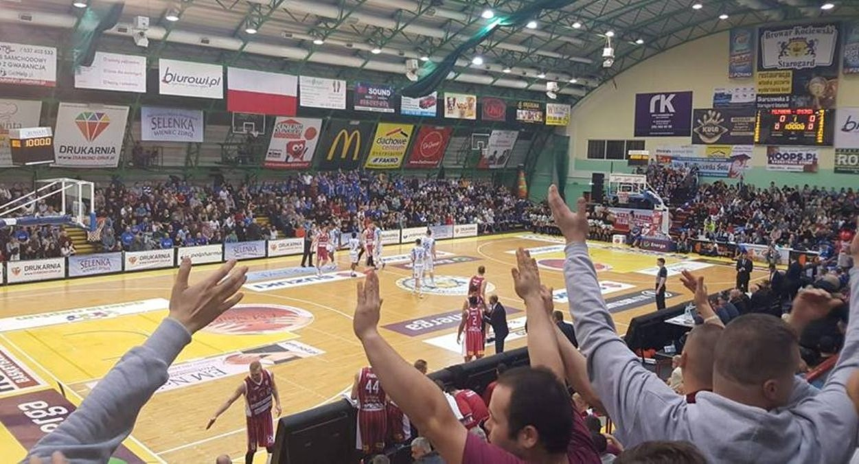 Polpharma - Spónia (29.12.2018)